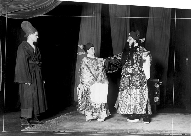 China, Prov. Chihli, Peking, Deutsche Aufführung eines chinesischen Lusstspiels an der Reichsuniversität. Seit der Erschließung Chinas für den westlichen Einfluß haben deutsche Wissenschaft und Literatur sich viel mit China beschäftigt. Es sei vor allem des 1930 verstorbenen Richard Wilhelm gedacht, der durch seine Übersetzungen chin. Klassiker diese dem dt. Volke nahegebracht hat. Auch Vinzenz Hundhausen hat sich durch Übersetzungen einen Namen gemacht. Unter seiner Leitung wurden an der Reichsuniversität Peking alle chin. Stücke in dt. Übersetzung aufgeführt; wir bringen ein Szenenbild aus dem Lustspiel " Das Examen "